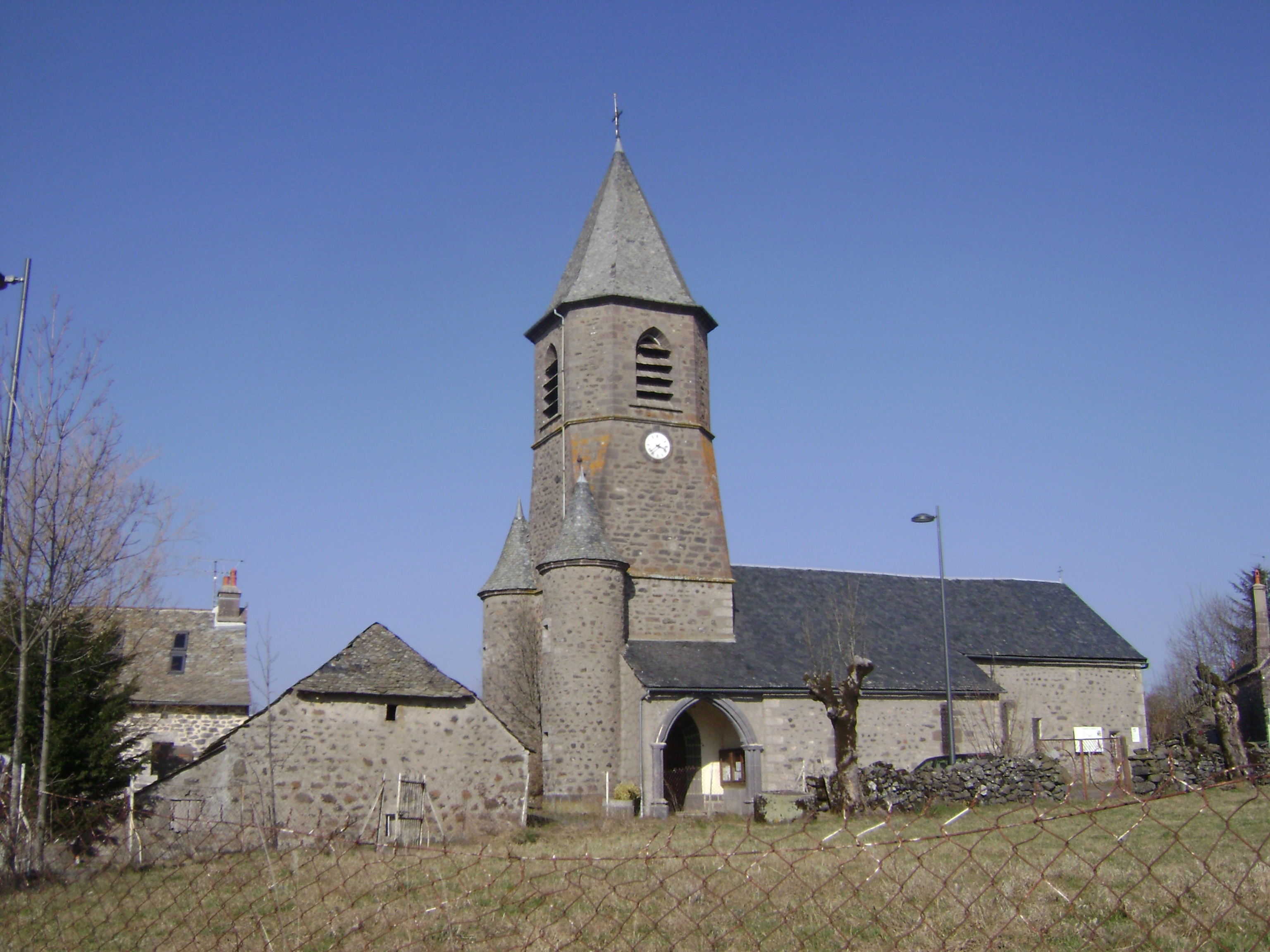 église fortifiée de La Terrisse (Aveyron)